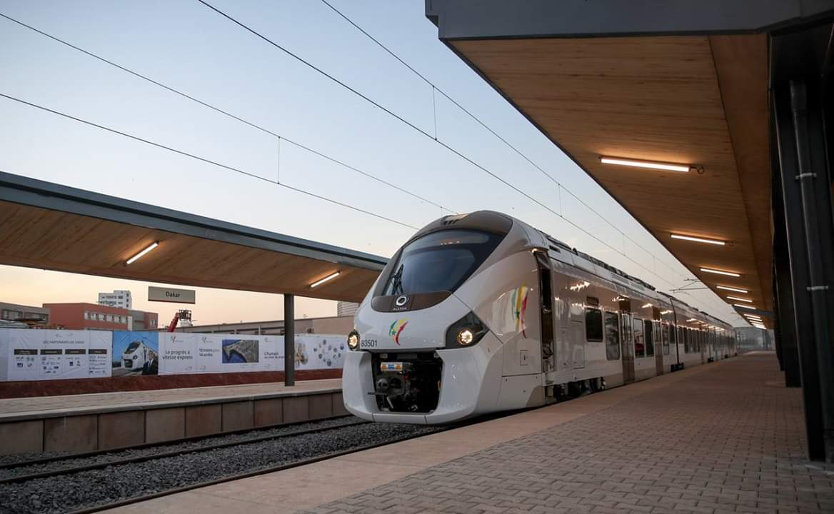 Le TER à la gare de Dakar, le 15 janvier 2019. (VOA/Seydina Aba Gueye) Le Sénégal dispose désormais d'un Train Express Régional qui fonctionne au courant électrique. Le TER va répondre aux besoins des déplacements d'environ 124.000 passagers et va générer 6000 emplois directs et indirects.